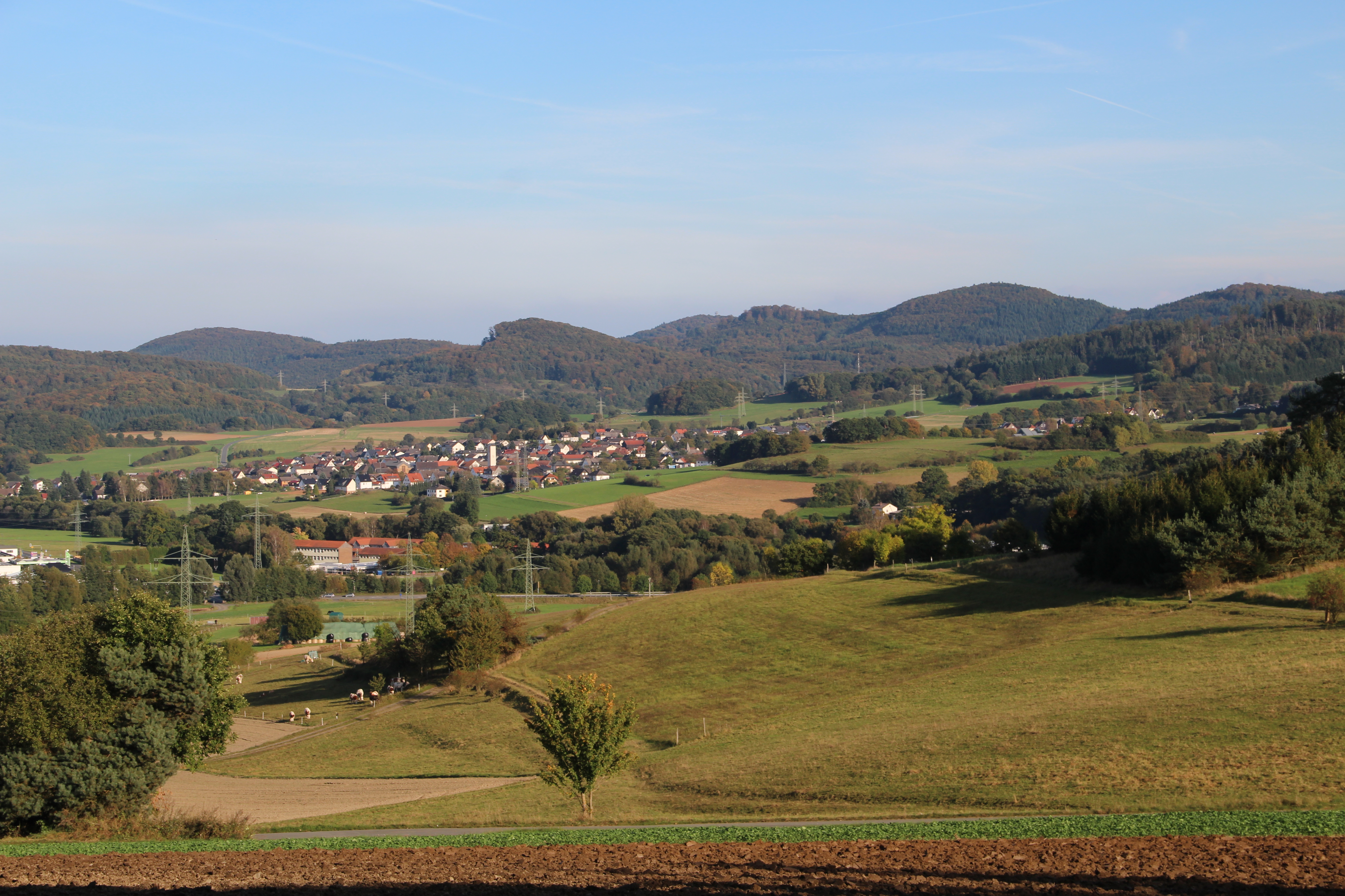 Friedensdorf - Ansicht von Westen